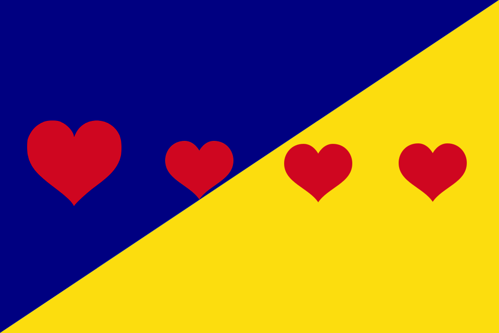 Bandera de Pangua